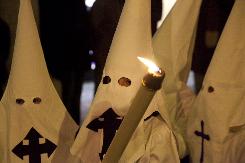 Detalle de la Hermandad de Caballeros del Silencio, Astorga (León, España).